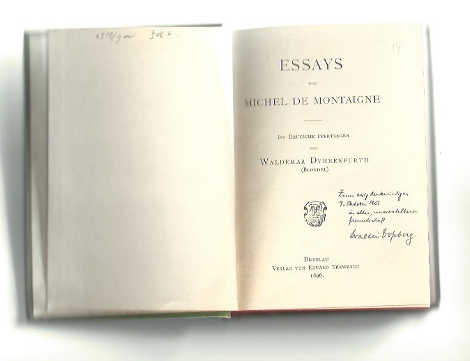 Übersetzung der Essays (Montaigne) von Waldemar Dyhrenfurth